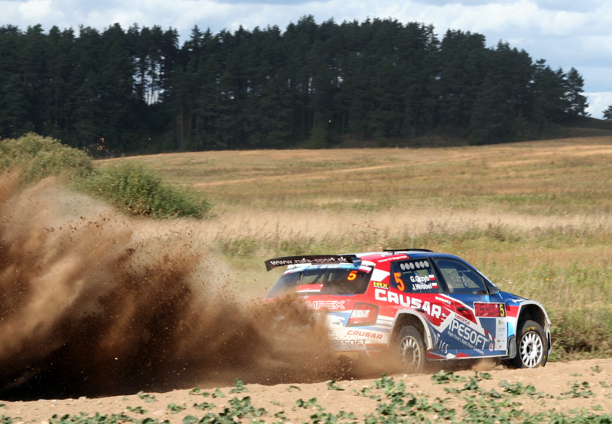 Rajd Polski 2018 - Grzegorz Grzyb